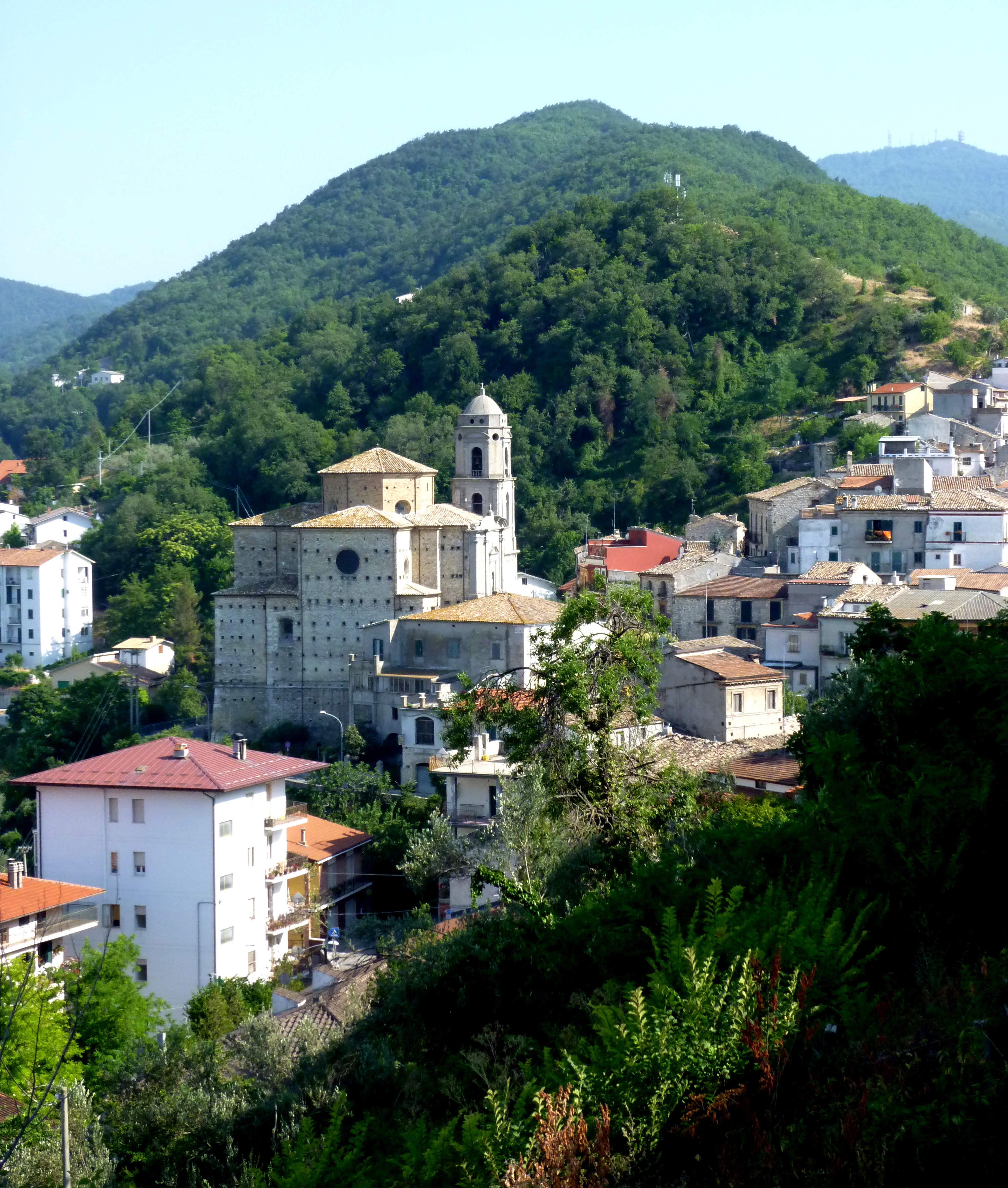 Veduta di Archi, Chieti, Italia.